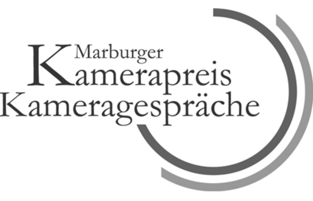 Logo des Marburger Kamerapreises.